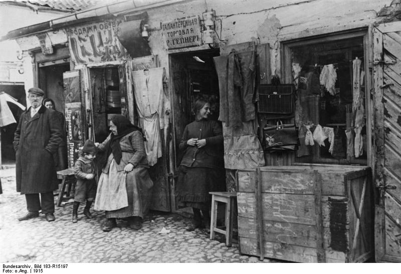 Bialystok, Schumachergeschäft Scherl Bilderdienst Bialystok, Russland: Ein Schuhmacherladen. 21435-15 [1. Weltkrieg 1914-1918, aufgenommen während der deutschen Besetzung]